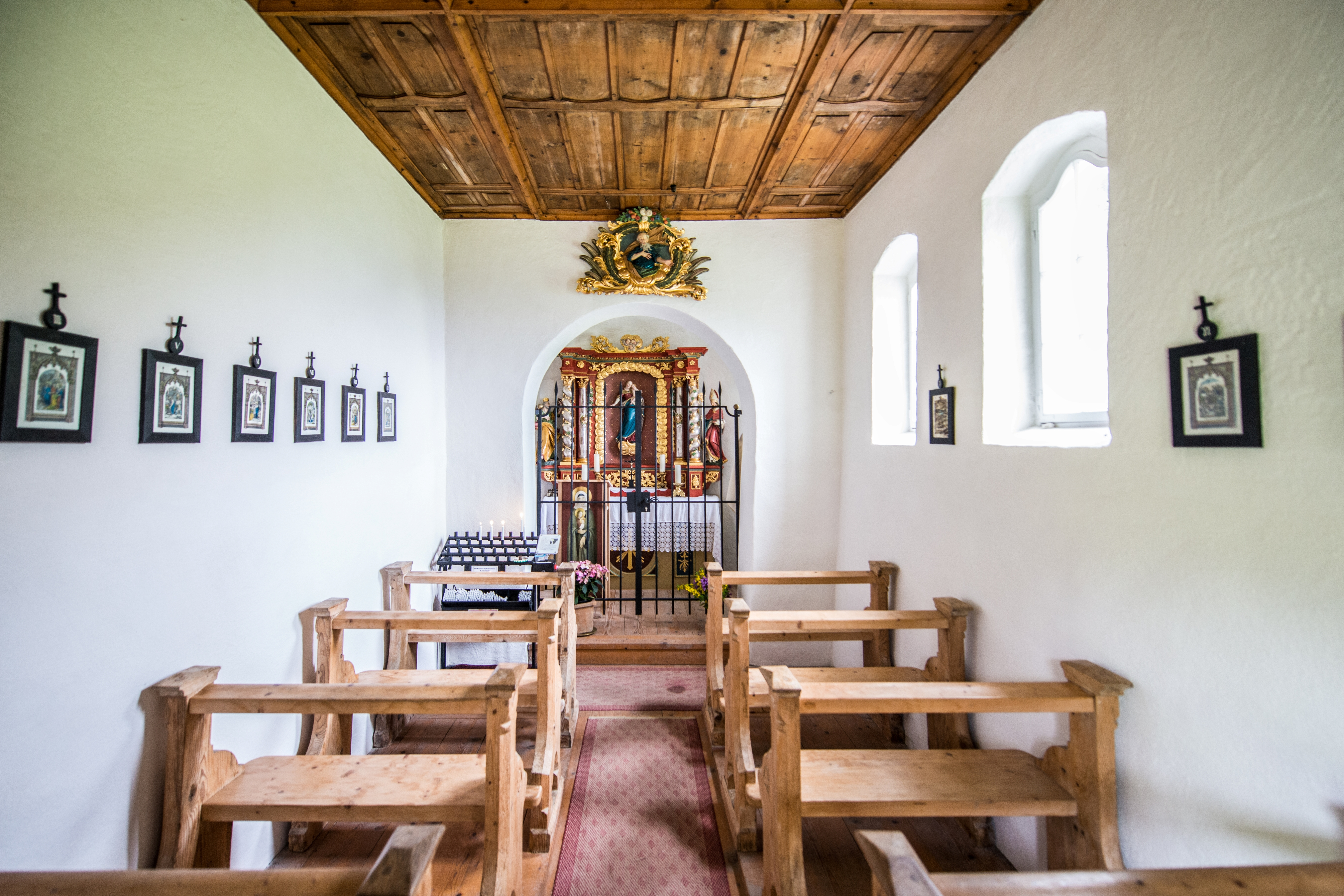 Kapelle Hl. Anna in Fontanella - Faschina. Der Steilhang im Hintergrund gehört zum Sonnenköpfle. aus dem DEHIO Vorarlberg 1983: Um 1700 als Stiftung von Dr. Josef Hartmann (später 1717-1720 Bürgermeister von Wien) erbaut. 1951/52 Restauriert. Rechteckbau mit Rundapsis unter gemeinsamem Satteldach und Glockendachreiter im Osten. Im Westen Vorzeichen mit Pultdach auf 2 Stützen, beschindelte Westgiebelfassade. Flachgedeckter Betraum mit Holzfelderdecke, eingezogener rundbogiger Chorbogen, Chorraum mit Wölbung. Barocker Altaraufbau um 1700, Altarbild hl. Anna mit Maria, Erstes 19. Jh., Figuren Hll. Maria mit Kind, Nikolaus, Andreas deponiert. Über dem Chorbogen Akanthuskartusche mit Relief Gottvater um 1700.